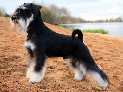 Цвергшнауцер черный с серебром Питомник "Ассон Ари"